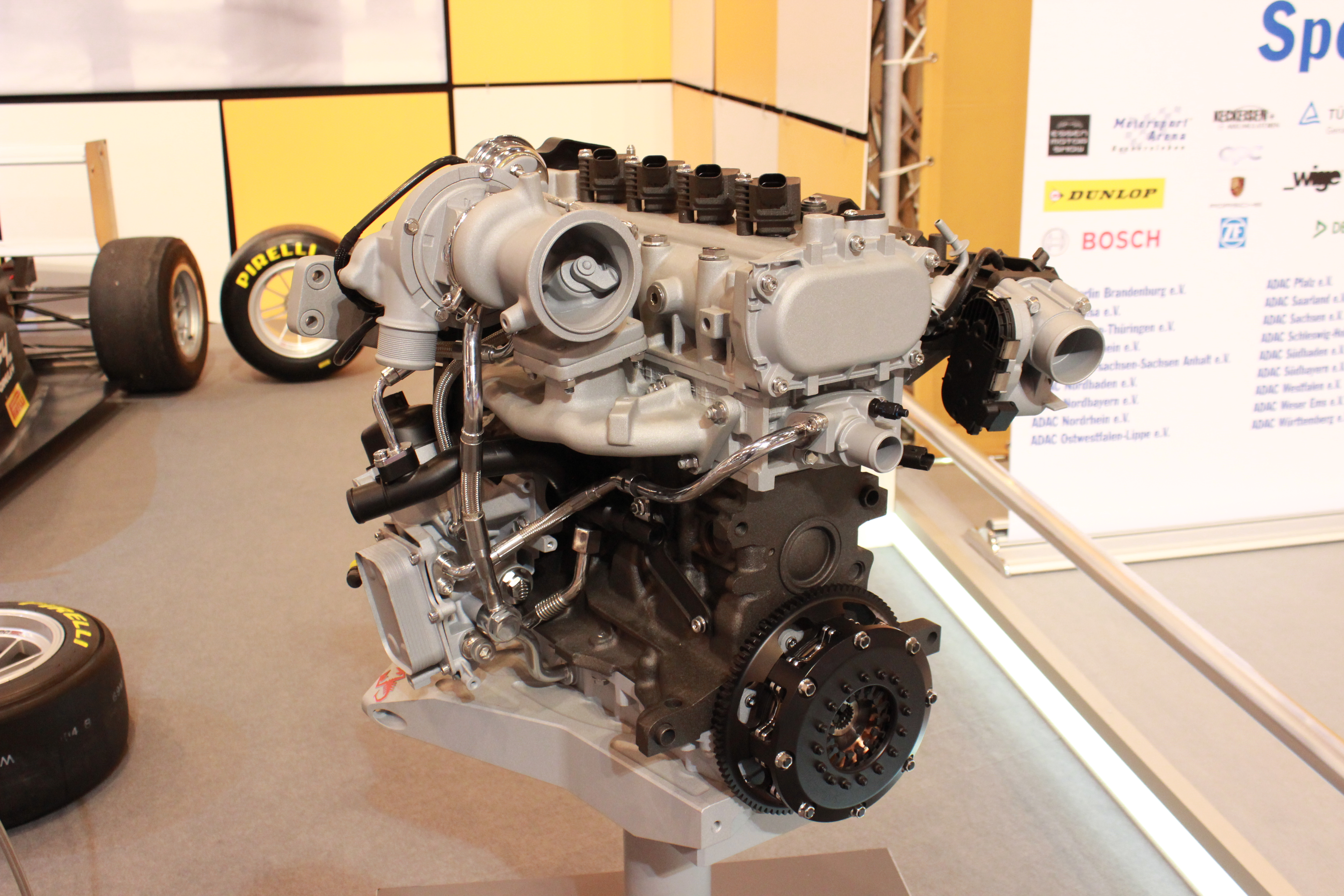 Formel 4 Abarth-Motor bei der Präsentation der ADAC Formel 4 auf der Essen Motor Show